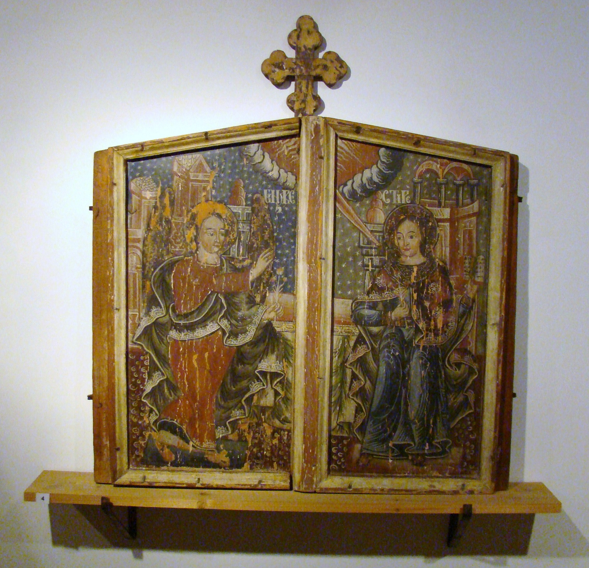 Biserica de lemn din Mintia, Hunedoara, mutată în incinta Muzeului Țăranului Român din București